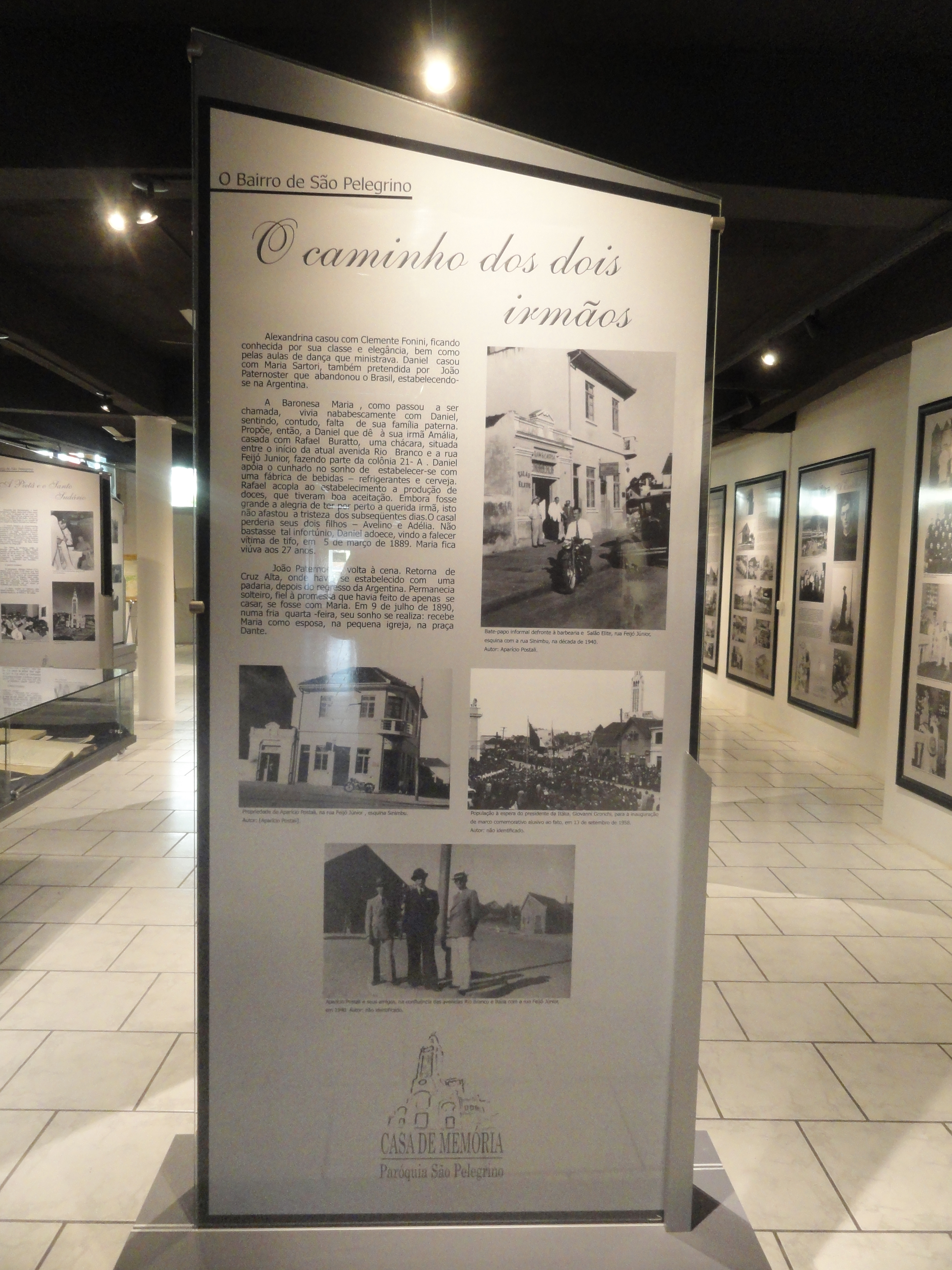 Painel descritivo da construção da Igreja de São Pelegrino, Casa de Memória da Paróquia de São Pelegrino